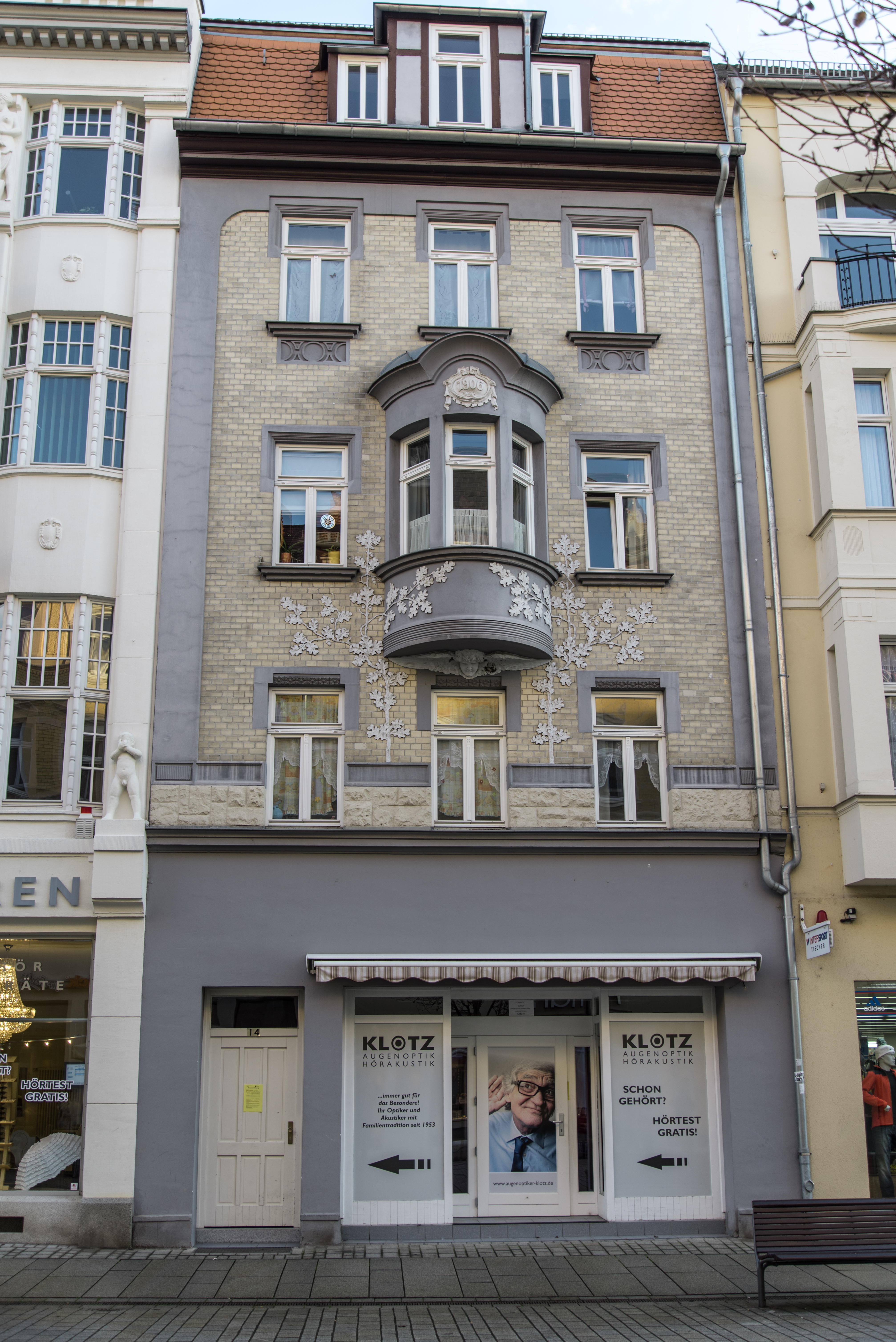 Weißenfels, Jüdenstraße 14